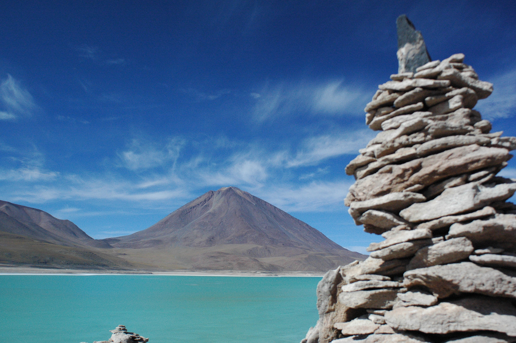 Pachata en laguna verde.